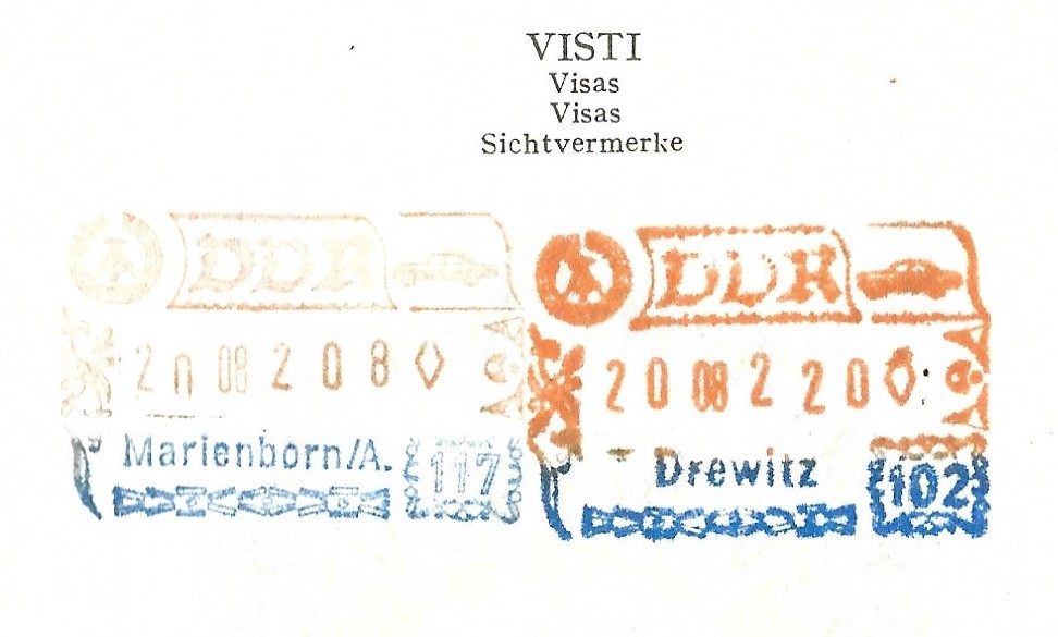 Sichtvermerk Grenzübergänge DDR 1980